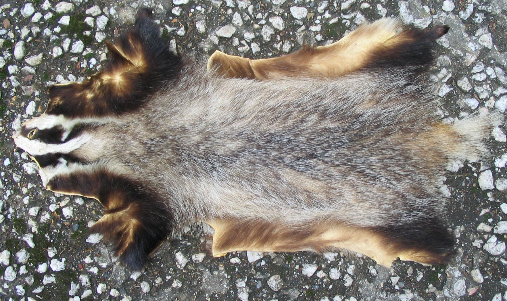 Dachsfell. Provenienz südlicher Westerwald, Karl Friedrich Herhold, erlegt ca. 1987